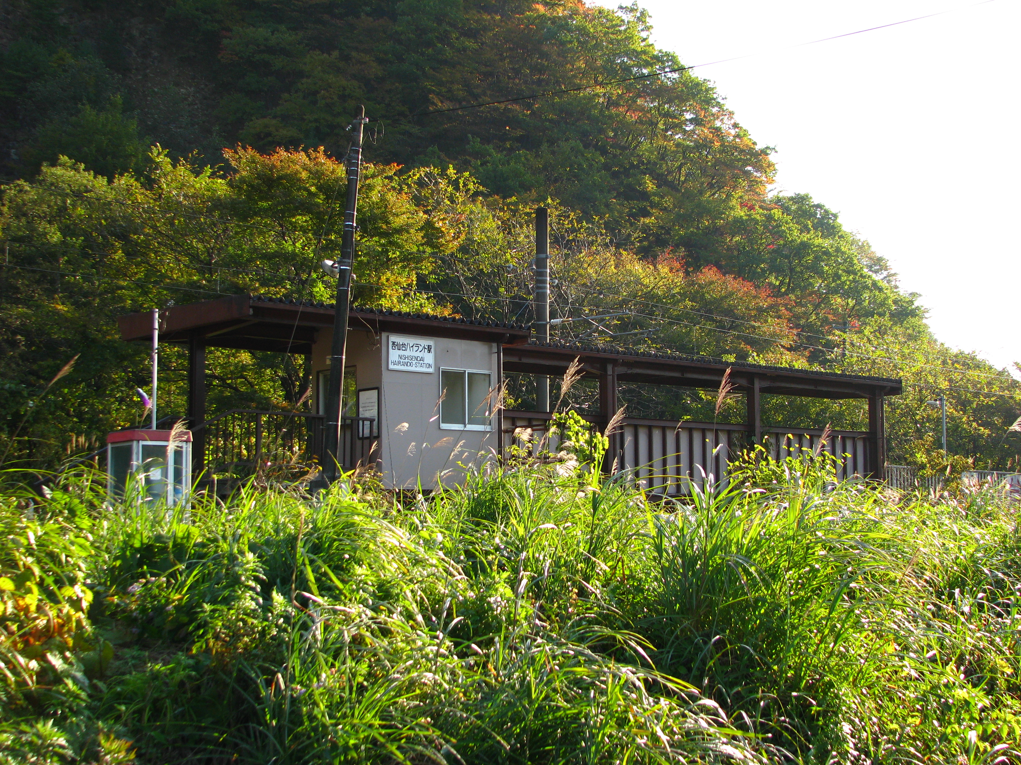 JR仙山線臨時駅の西仙台ハイランド駅駅舎。